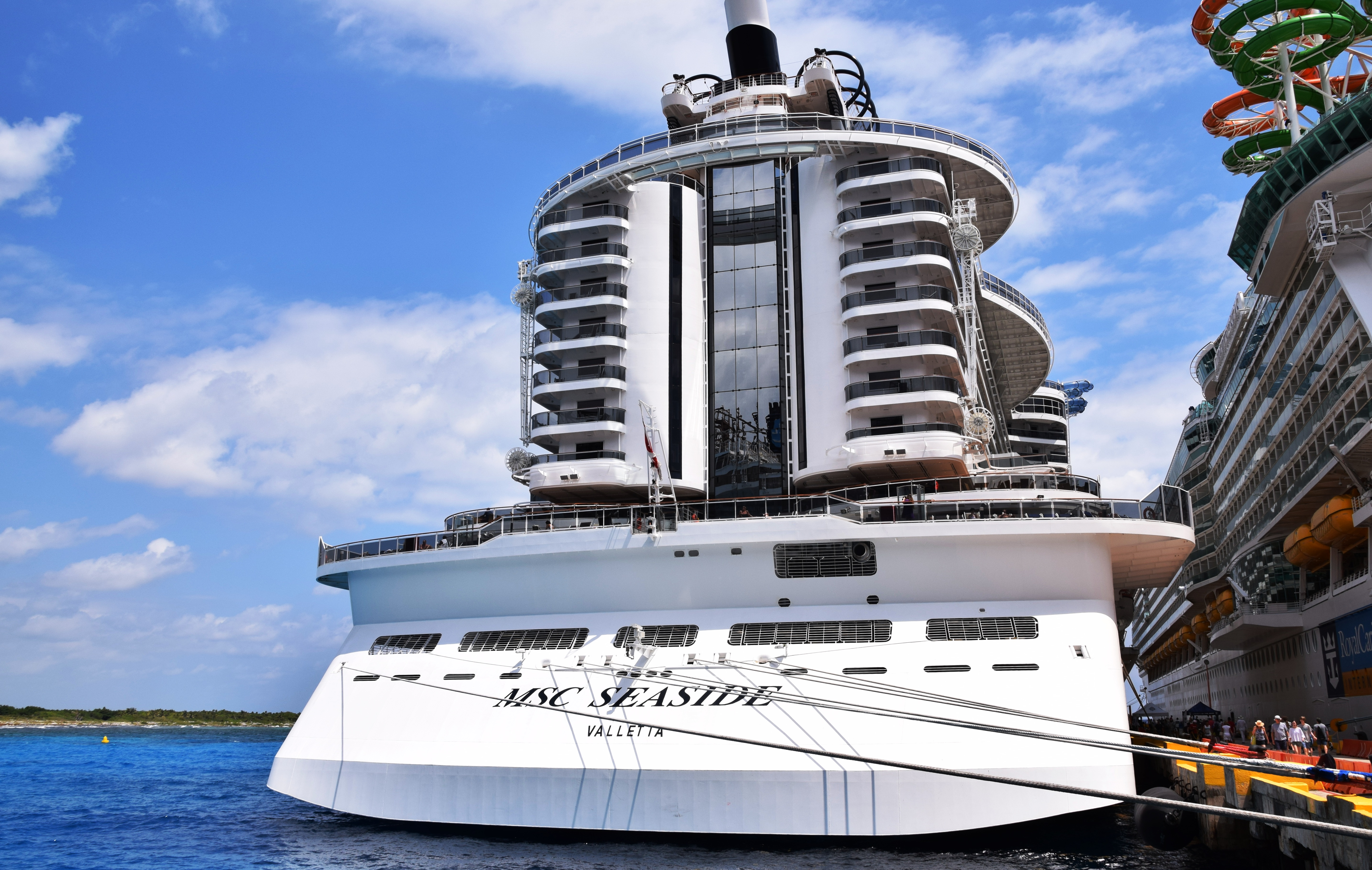 MSC Seaside